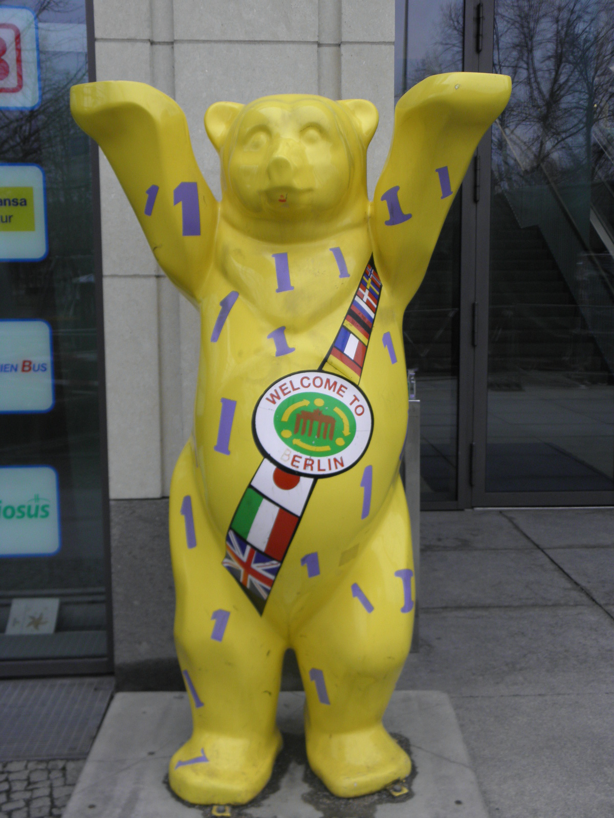 Берлін, січень 2011. Фігурка ведмедя - сучасний символ Берліна